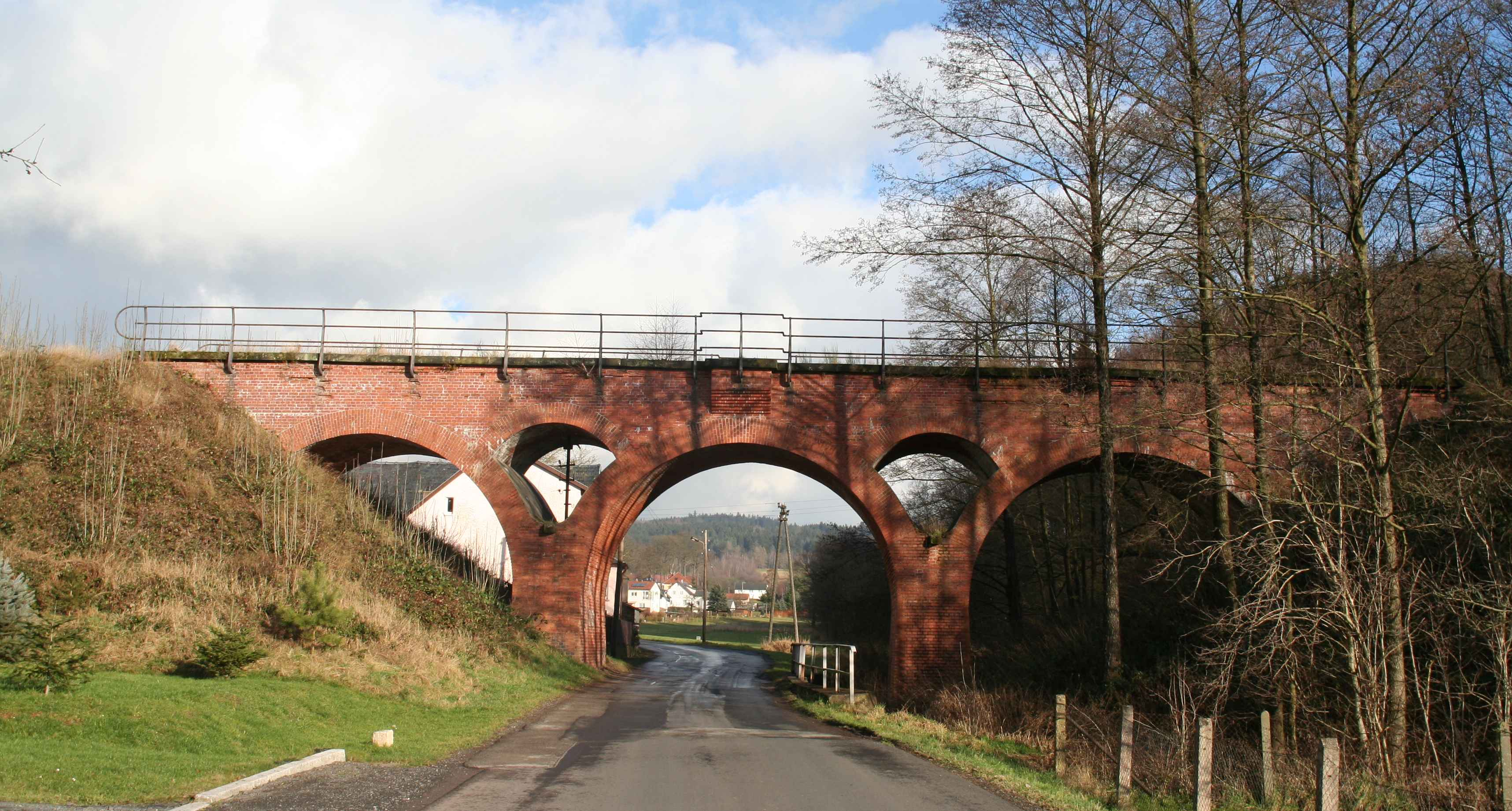 Viadukt bei Schwärzdorf/Föritz ehemalige Eisenbahnbrücke bei Schwärzdorf/Föritz (Landkreis Sonneberg), Bahnstrecke Sonneberg–Stockheim